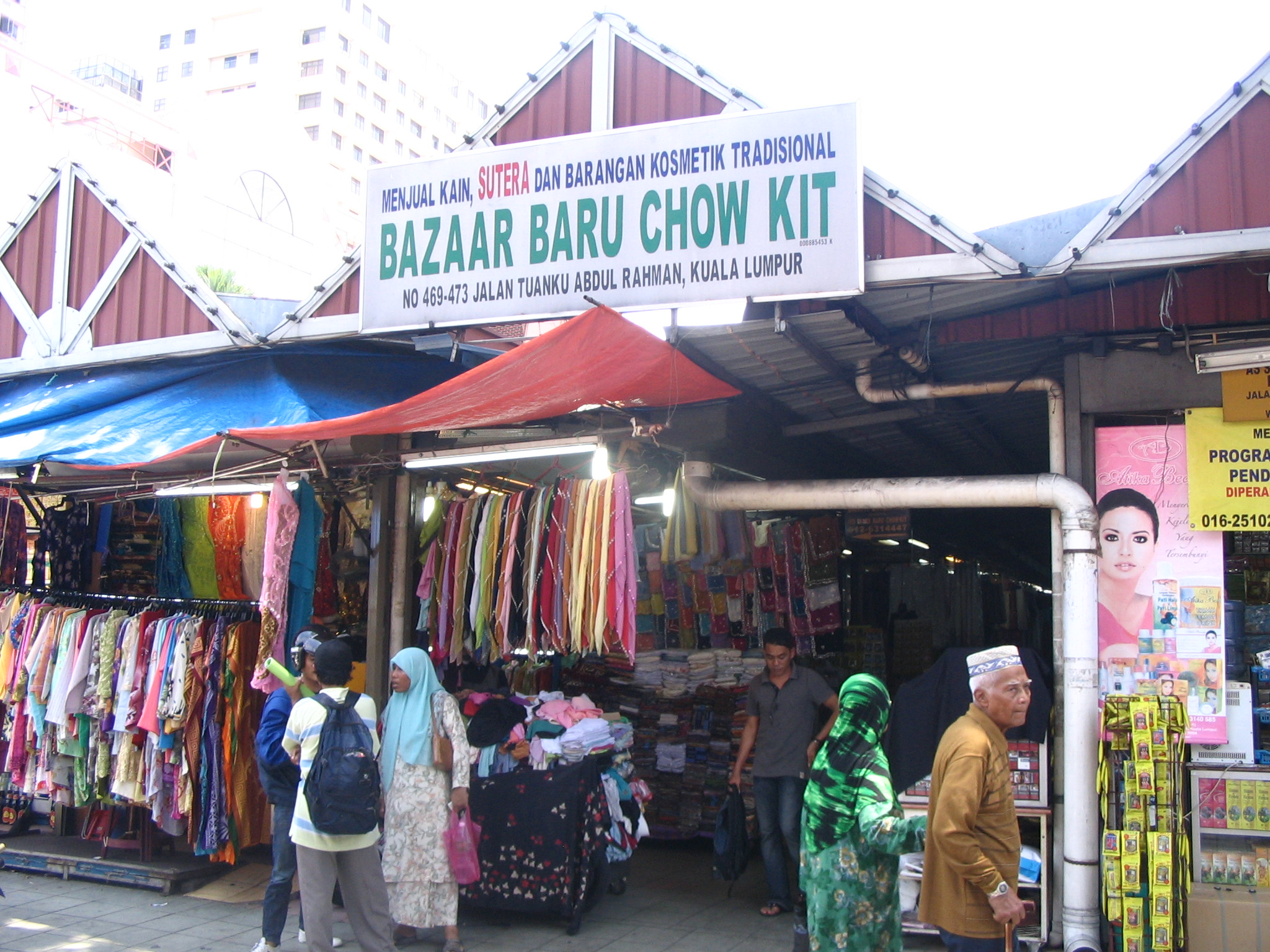 Bazaar Baru Chow Kit, KualaLumpur, Malaisie, Entrée du marché cote Jalan Abdul Rahman